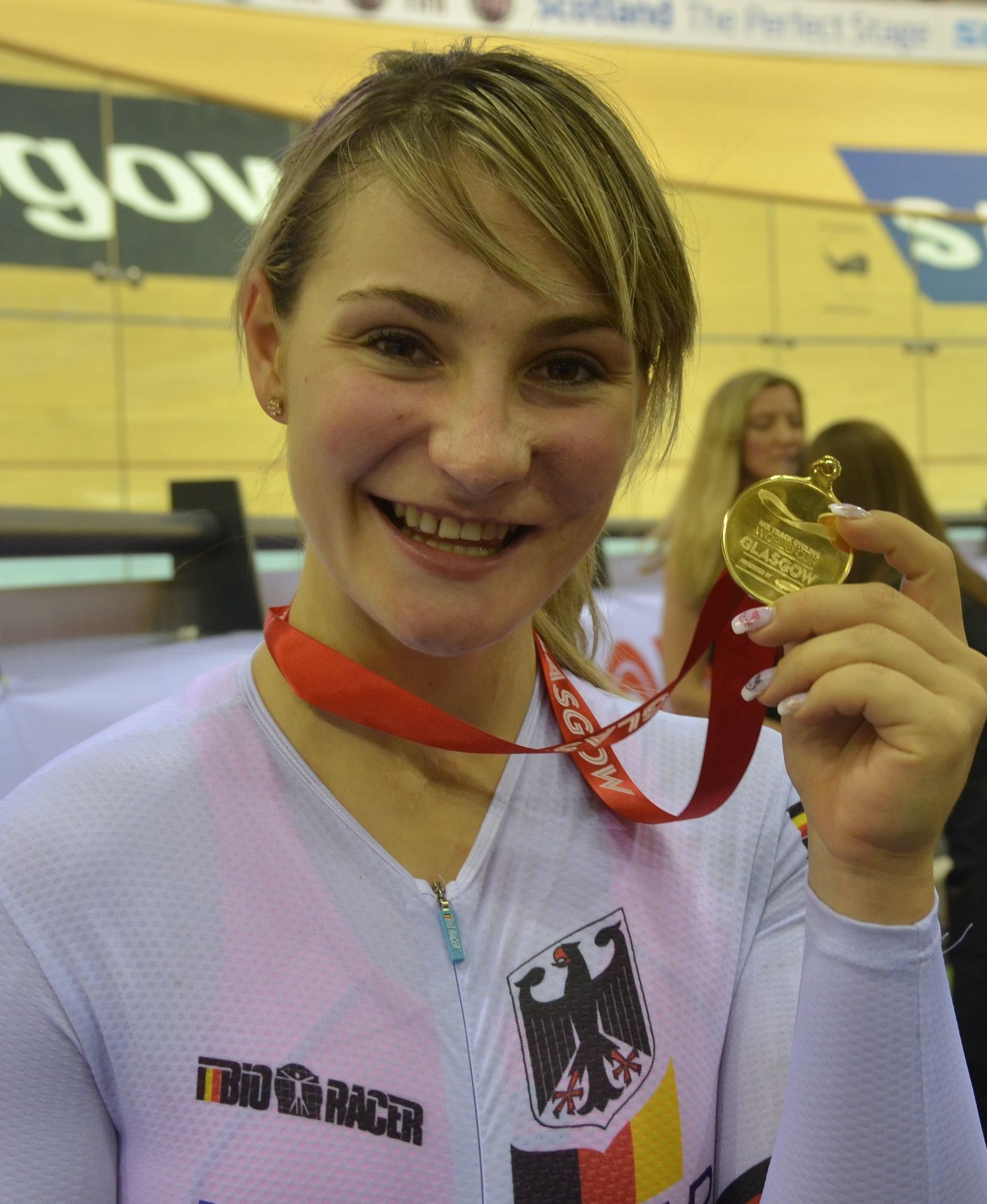 Kristina Vogel, Siegerin im Sprint, Bahnrad-Weltcup 2012 in Glasgow